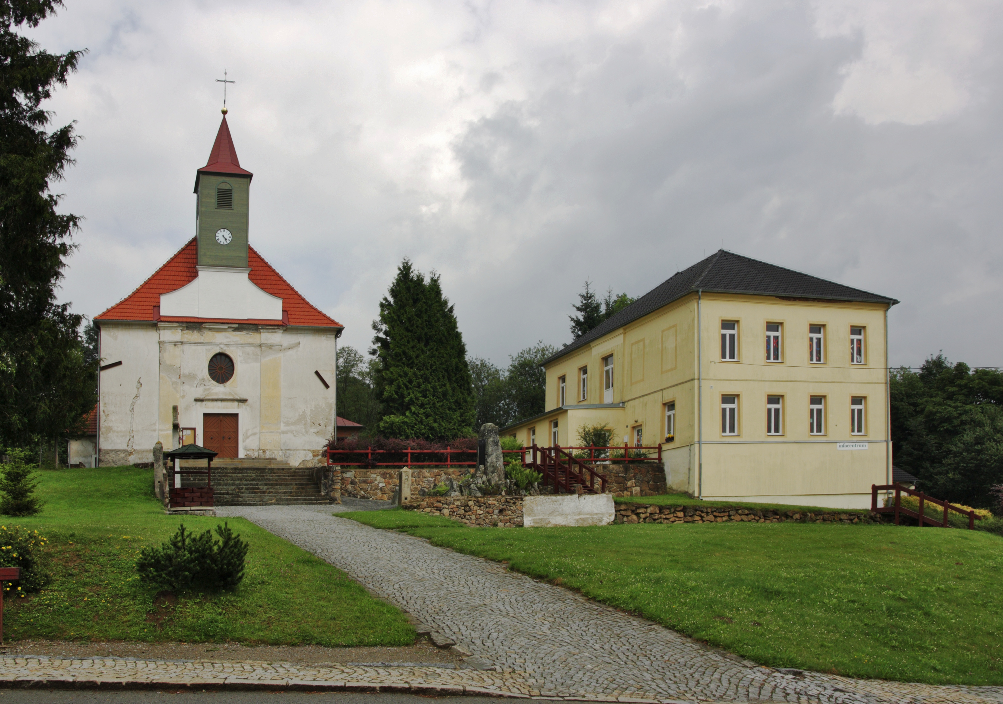 Pohorská Ves - kostel svatého Linharta a bývalá fara, nyní infocentrum.